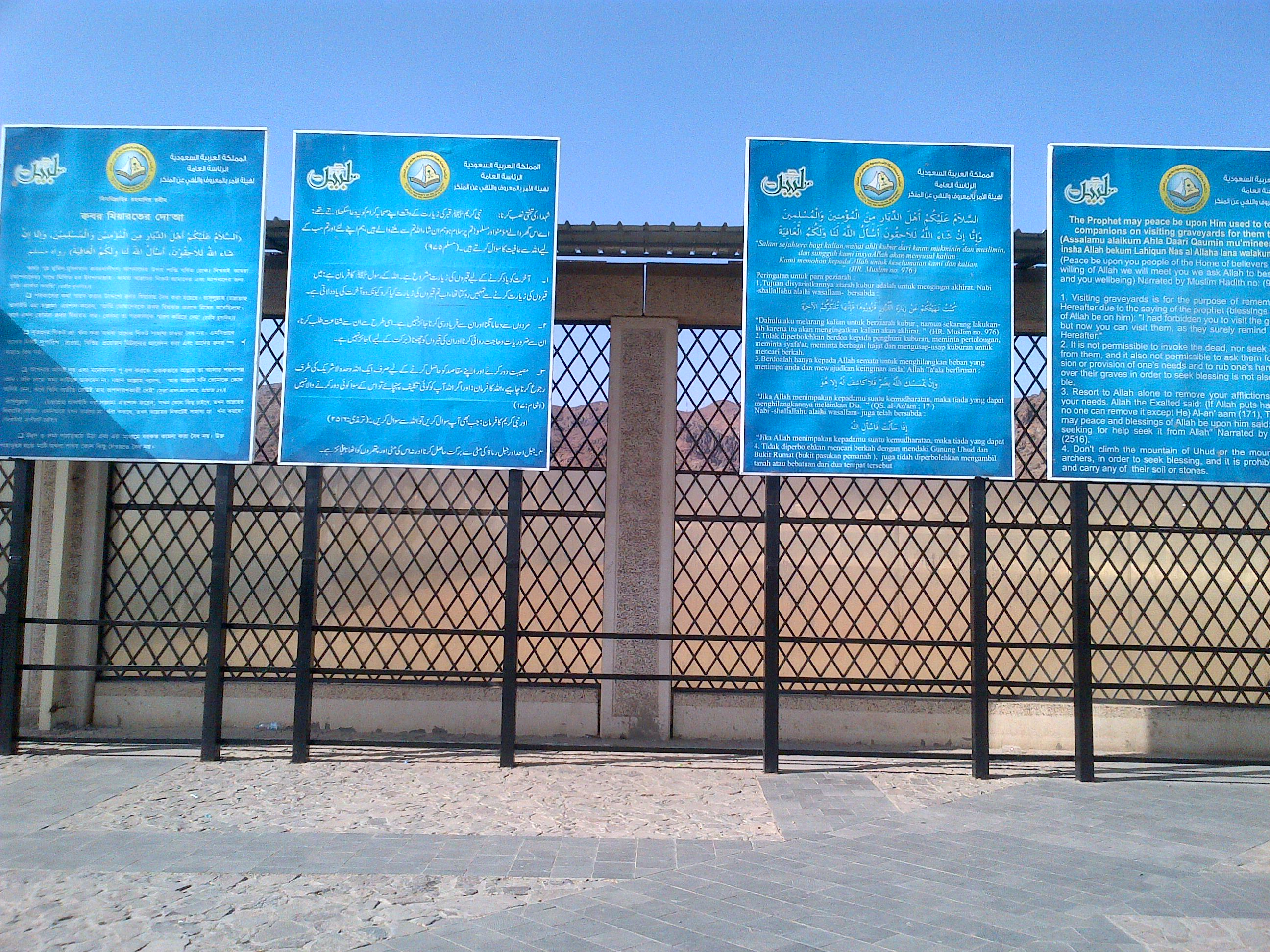 Tempat ini adalah tempat pertempuran Uhud